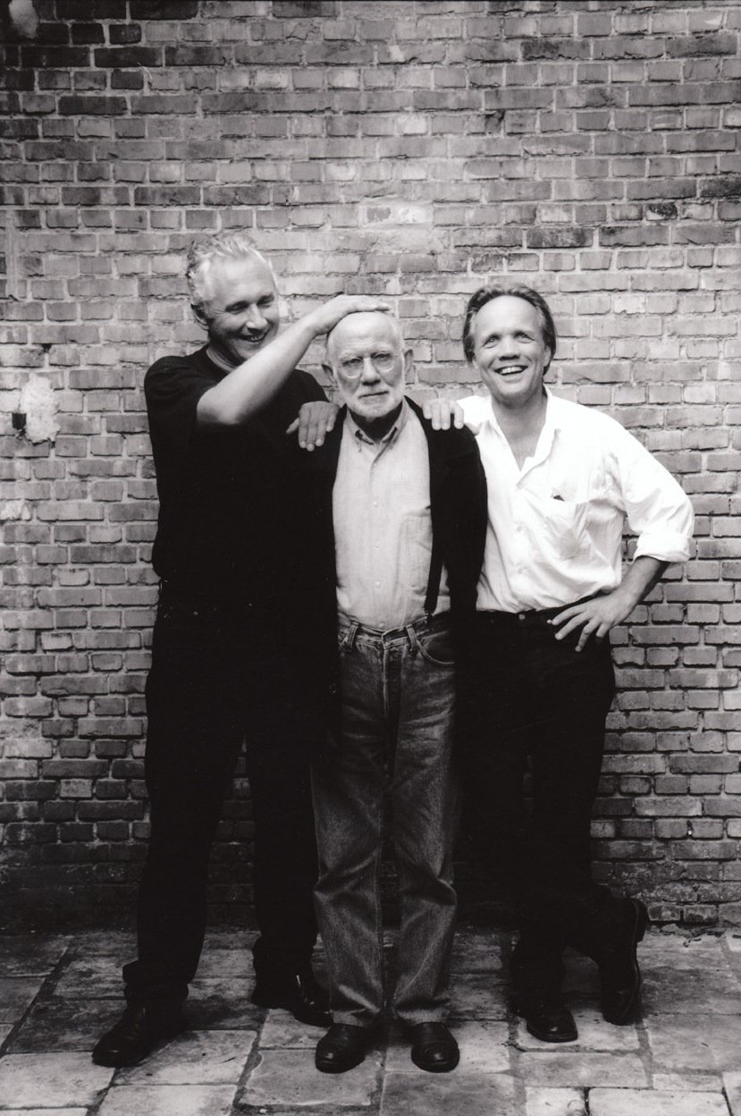 Kunstschilder Dan Van Severen met zijn zoon Maarten (links) en Fabian.